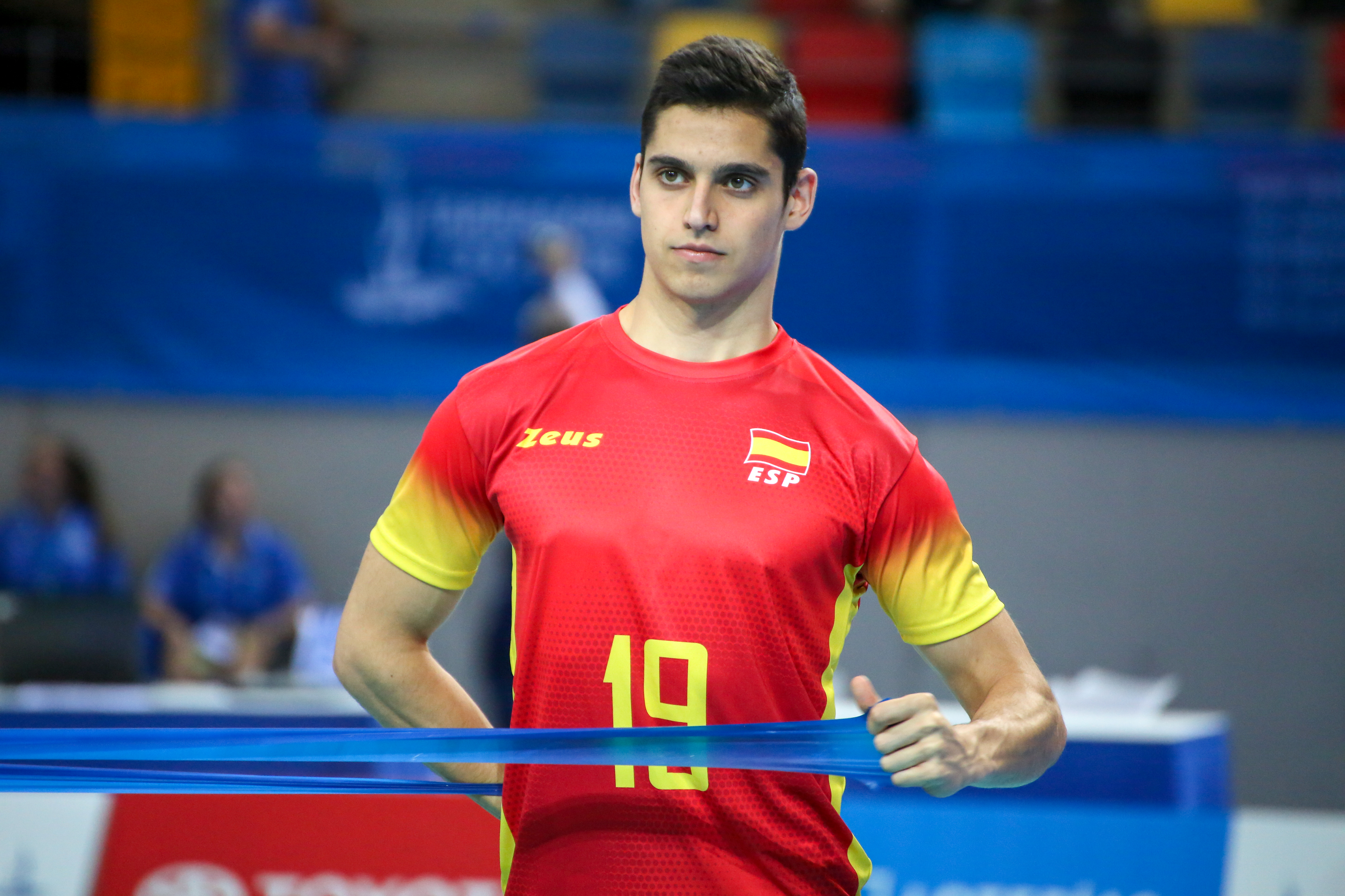 Ruben Lorente Camacho - Juegos del Mediterráneo 2018